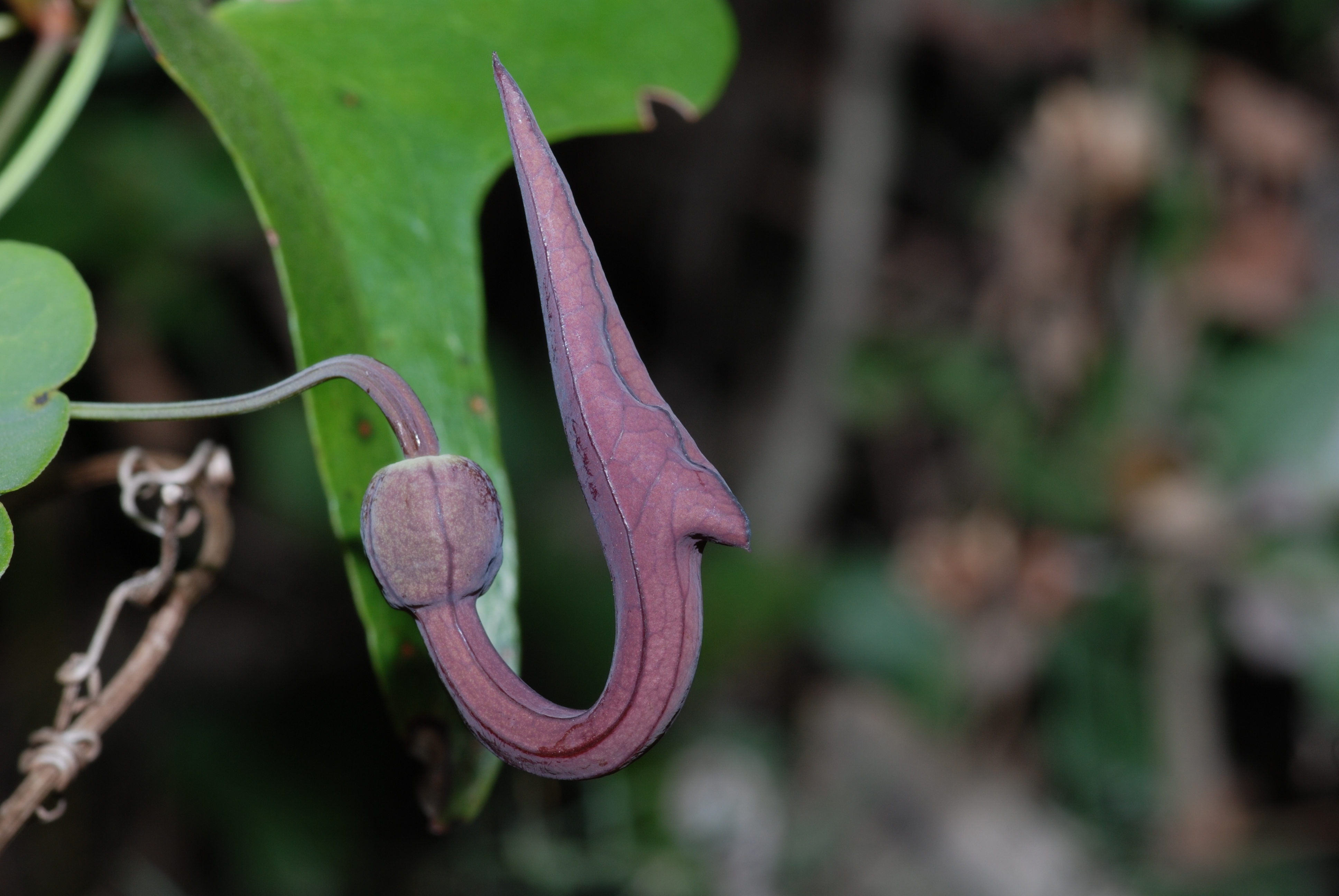 Balsamina Aristolochia baetica en el Parque natural de los Alcornocales.